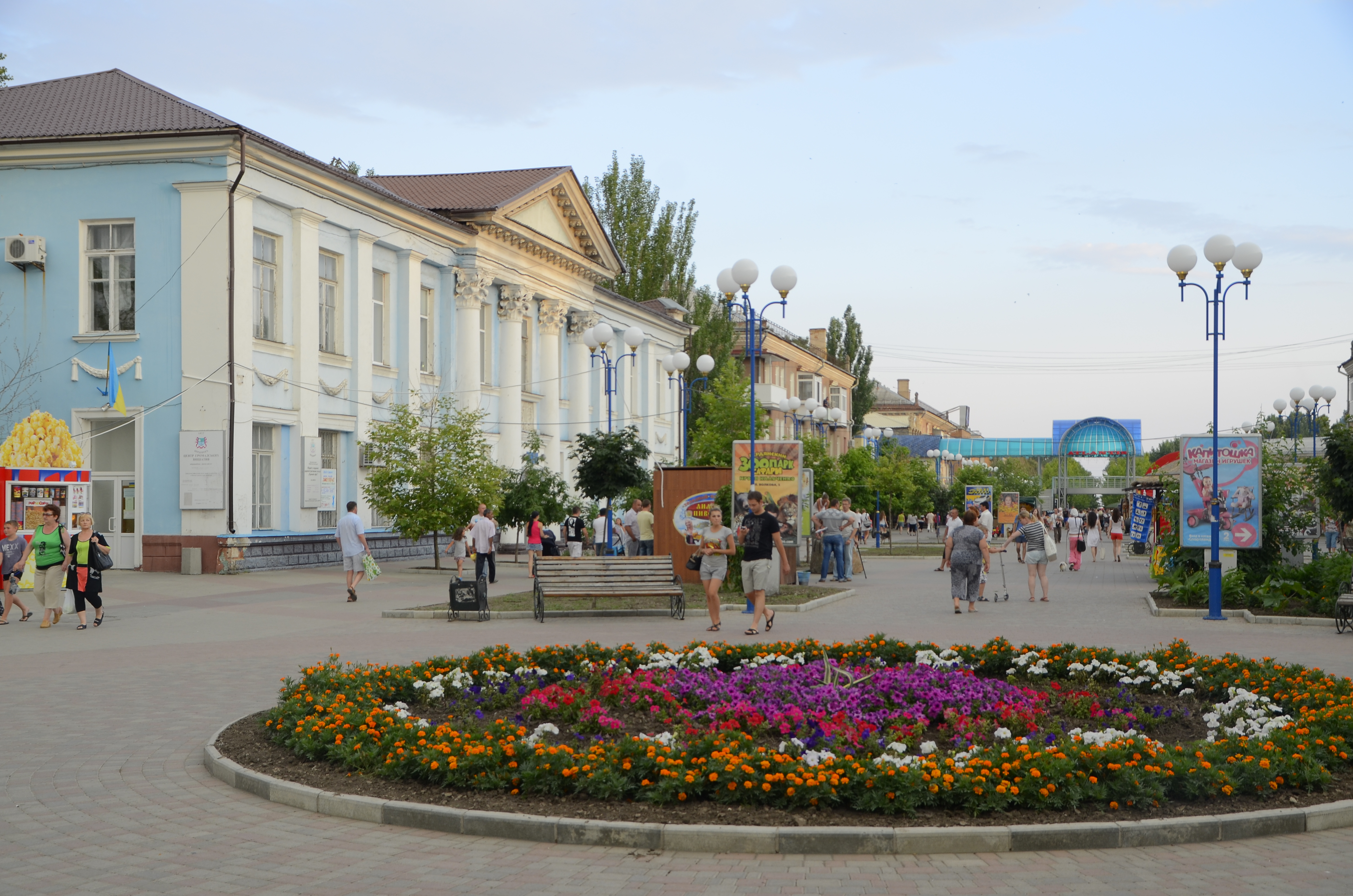 Бердянск